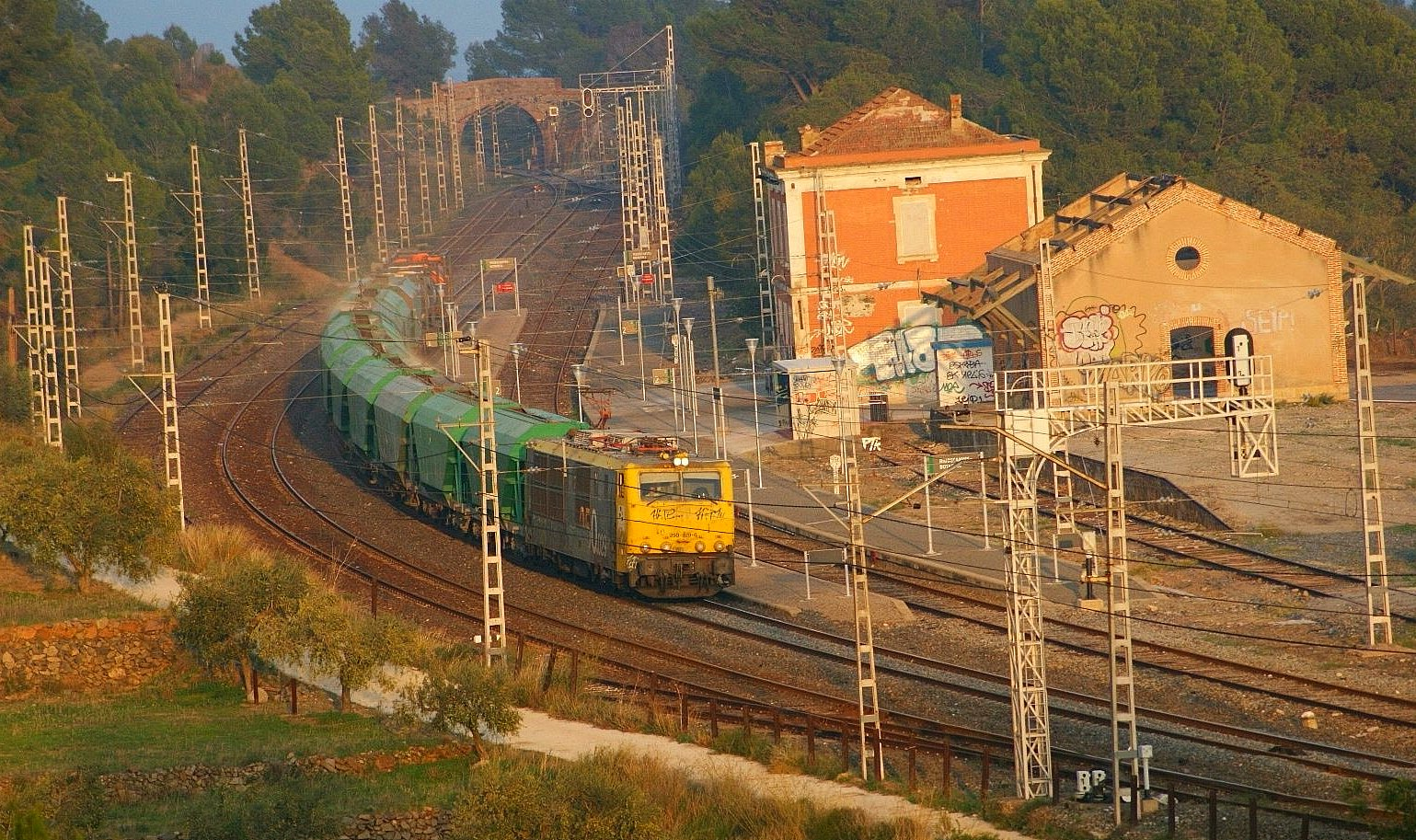 De les últimes circulacions que vaig tenir a l'estació de Riudecanyes, va ser el mixt de fosfat + clor cap a Flix i procedent de Tarragona classificació a càrrec de la 250.029.